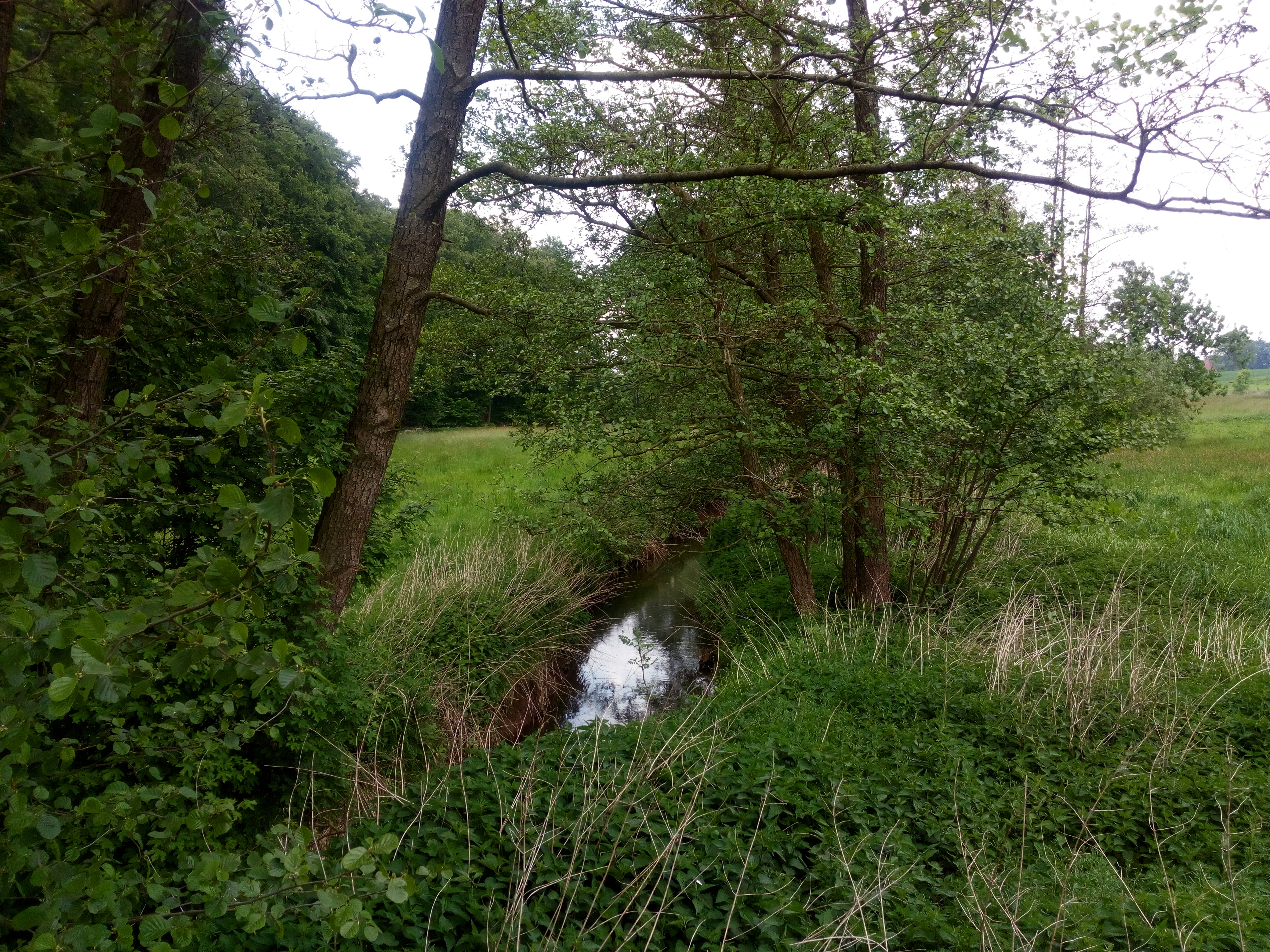 Der Kilverbach ist 7 km lang und die Grenze zwischen Rödinghausen und Melle bzw. Nordrhein-Westfalen und Niedersachsen, aber nur auf der niedersächsischen Seite ein Naturschutzgebiet. Hier kommen viele seltene und gefährdete Pflanzen- und Tierarten vor, deswegen gibt es nicht überall Wege. Am Rand des Naturschutzgebietes findet man einen herrlichen Radweg nach Bruchmühlen abseits der Hannoverschen Straße von Melle.